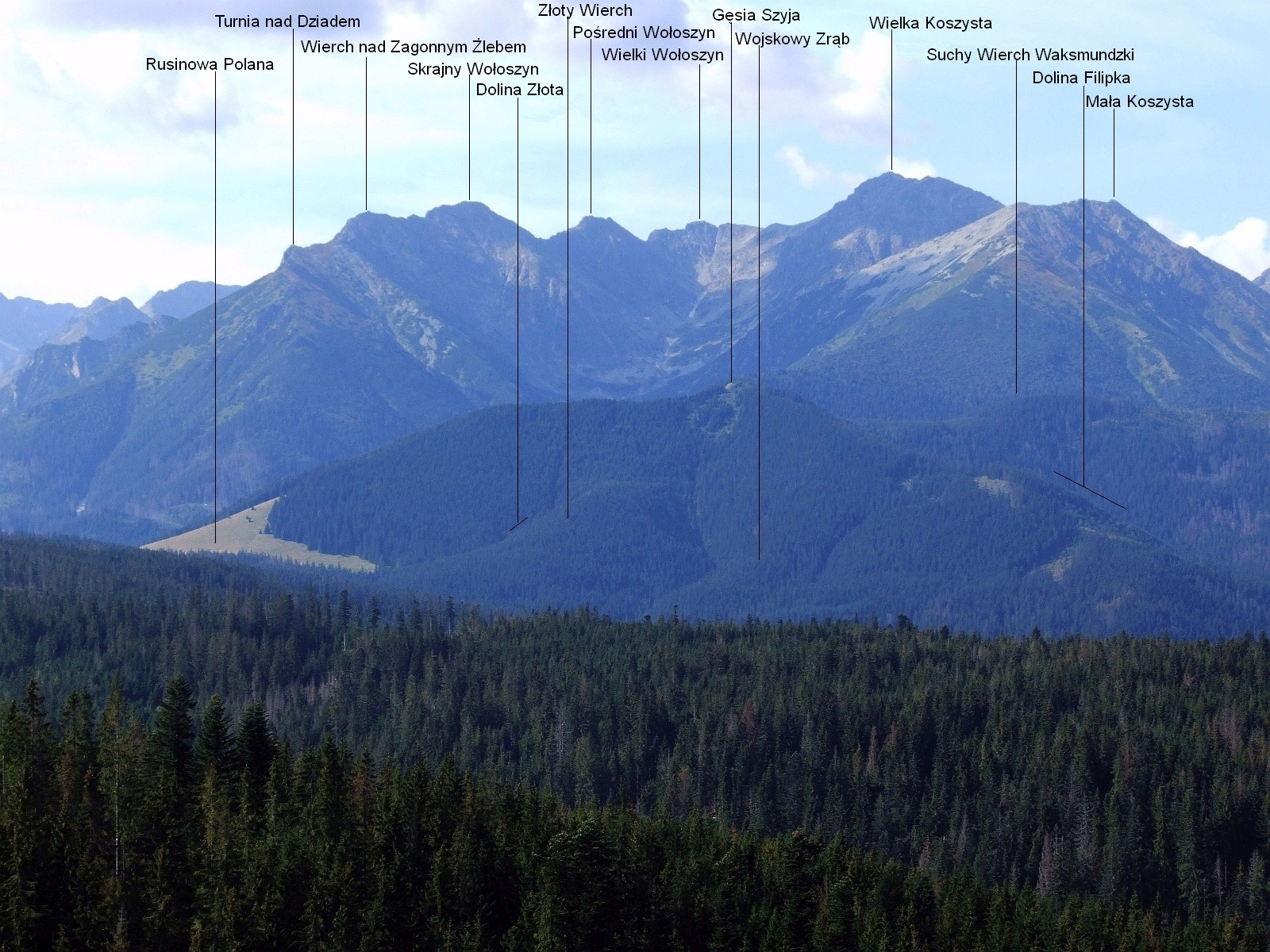 Widok z polany Głodówka